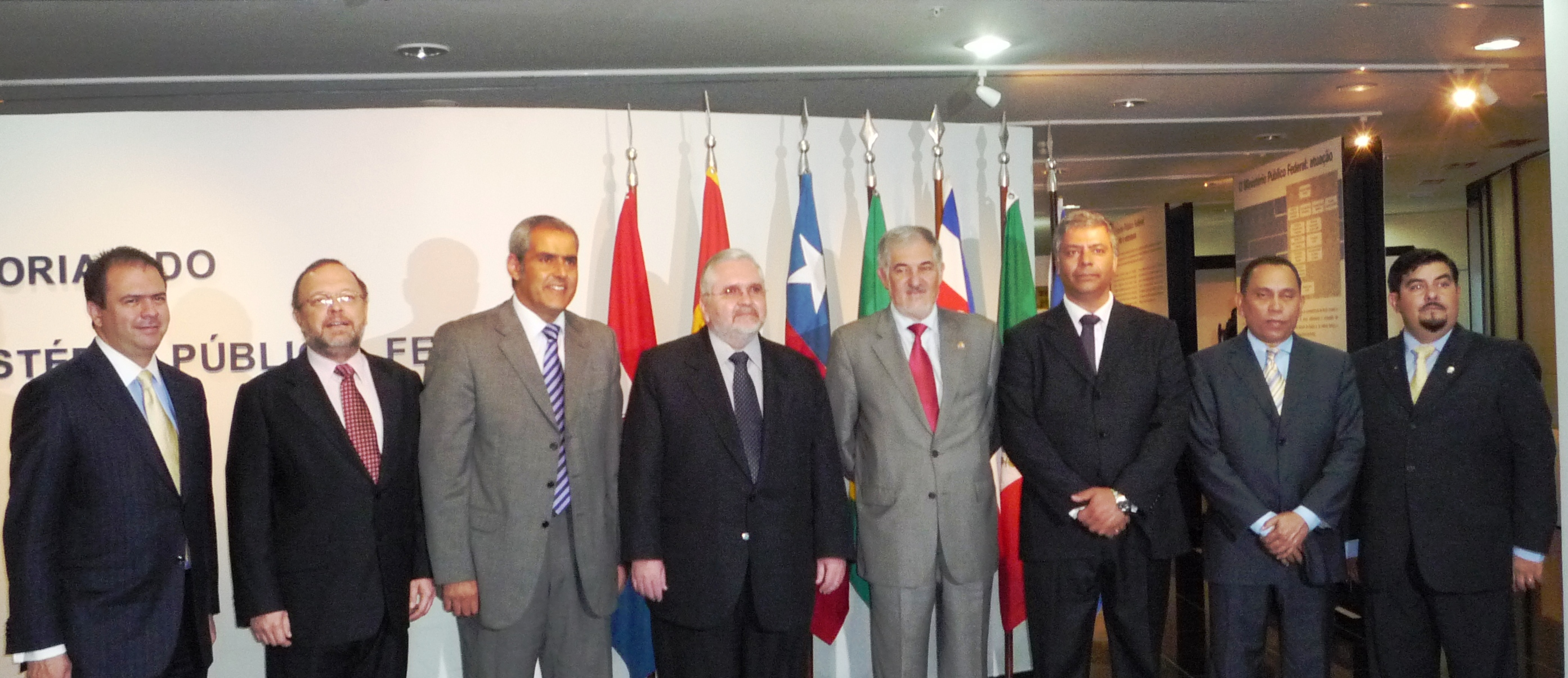 El actual y el anterior Presidente de la AIAMP, con otros Fiscales Generales Iberoamericanos